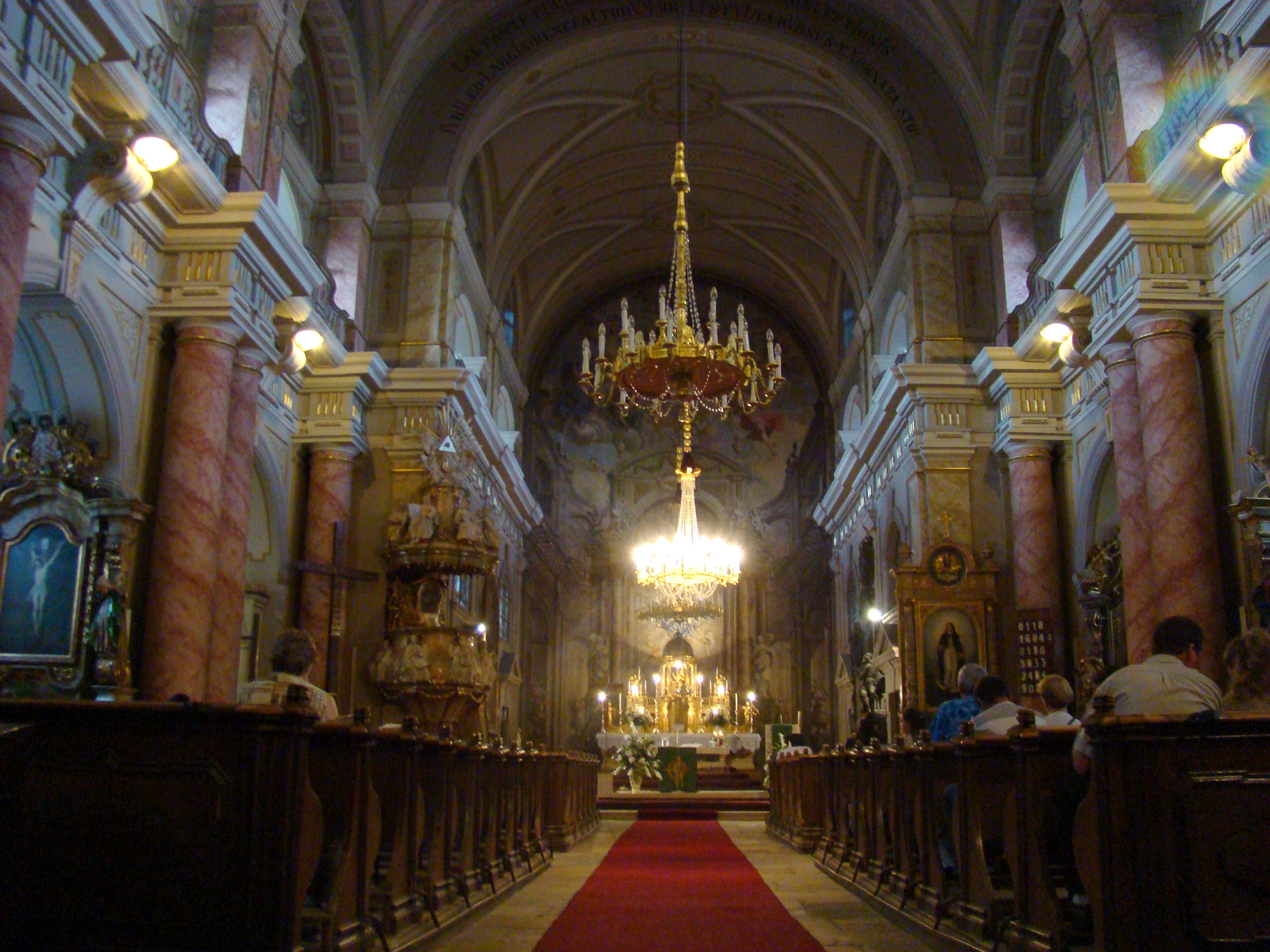 Biserica parohială romano-catolică din Sibiu